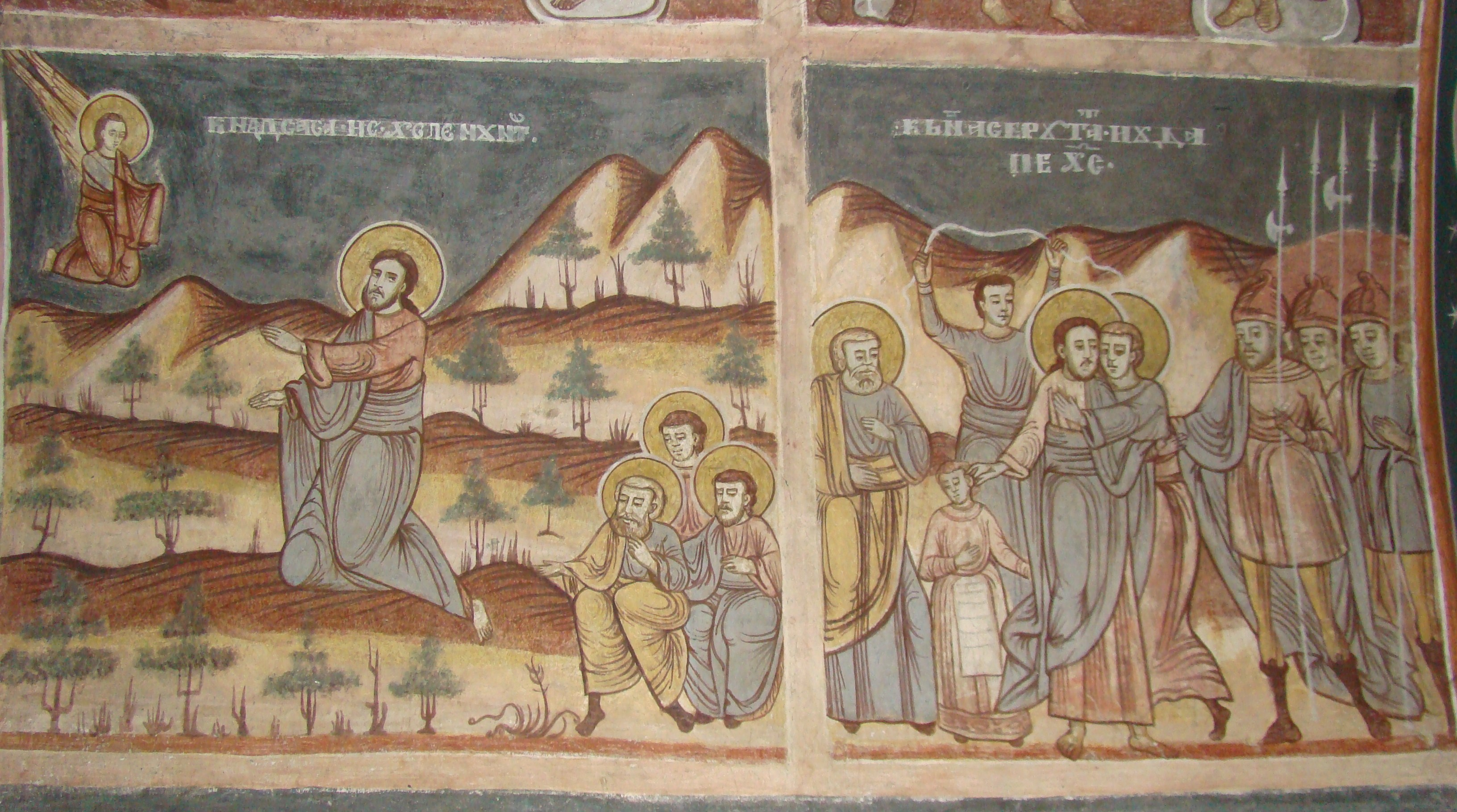 Biserica „Sfânta Treime", sat Vale, oraș Săliște, judet Sibiu